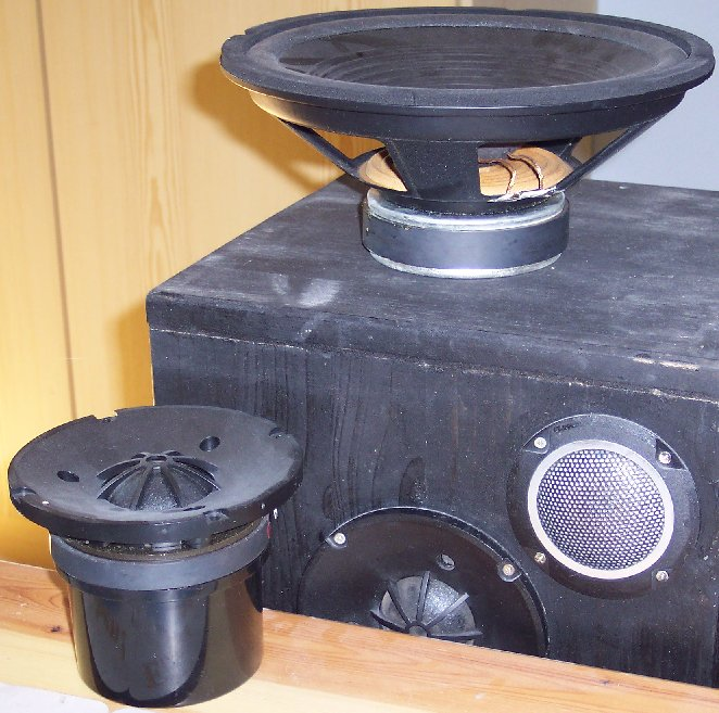 Lautsprecher